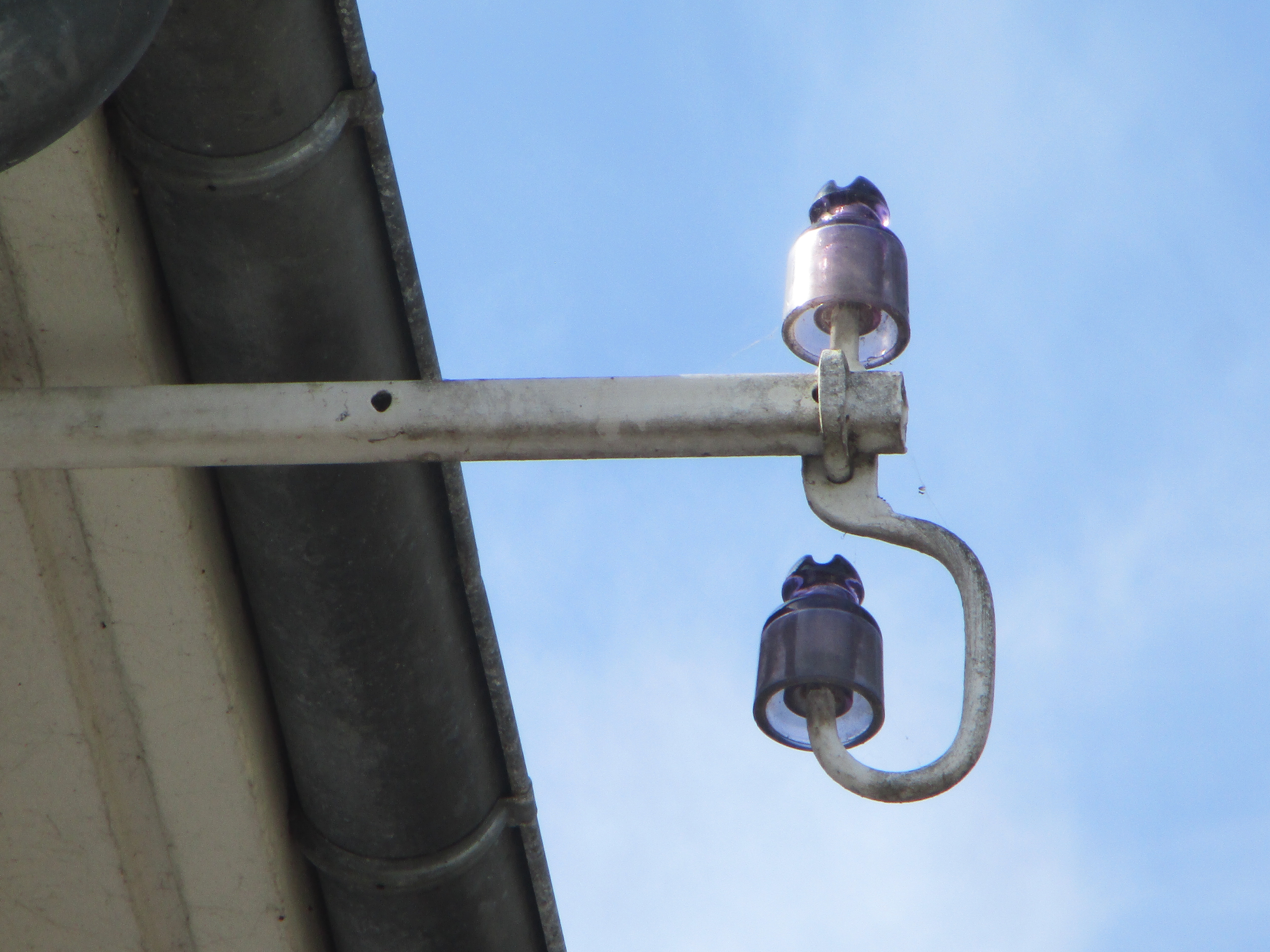 Photographie prise à la Tranche sur Mer (Vendée) et montrant deux isolateurs en verre violet de fabrication Verrerie d'Albi.